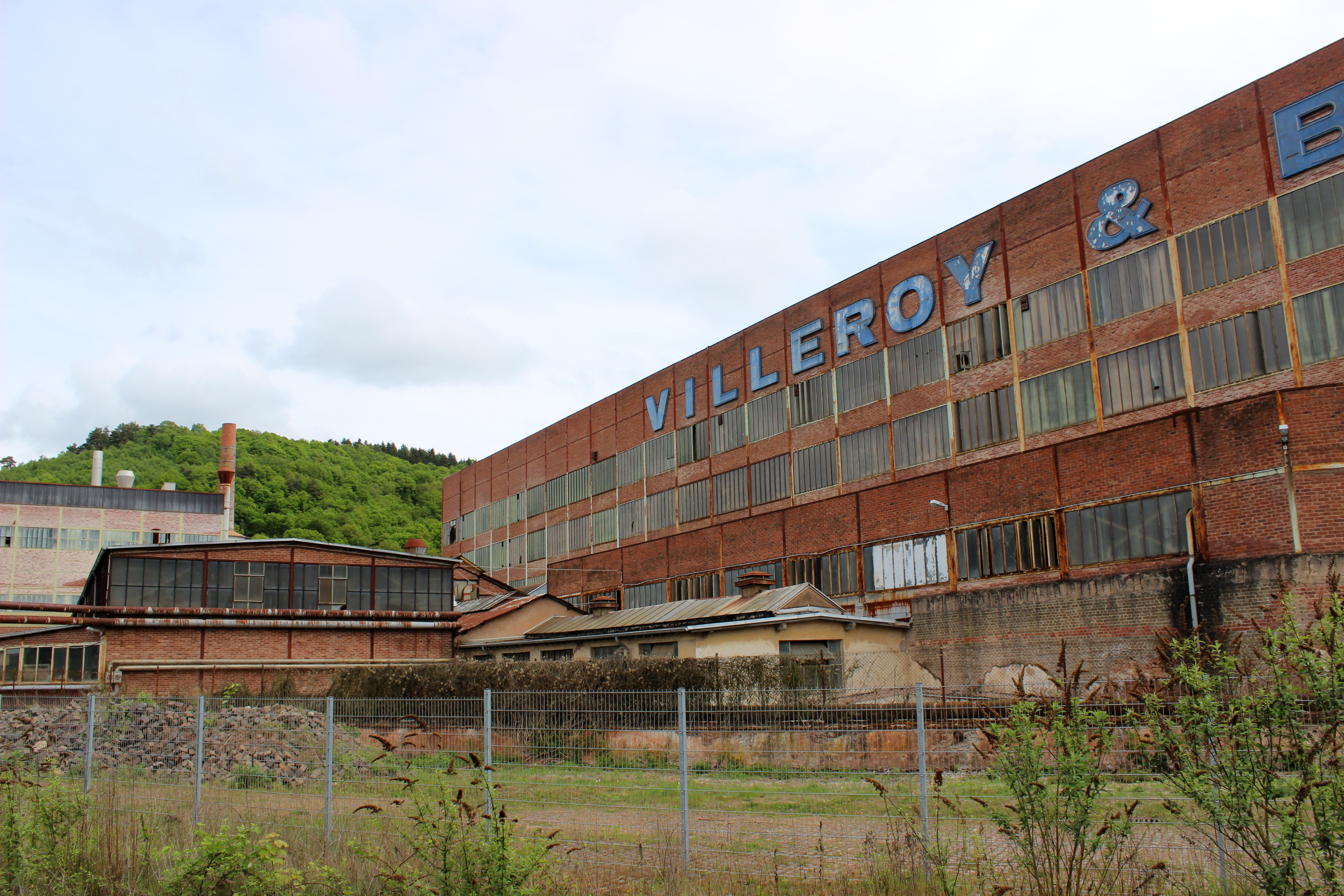 Fabrikgebäude von Villeroy & Boch am Bahnhof Mettlach, Saarland.